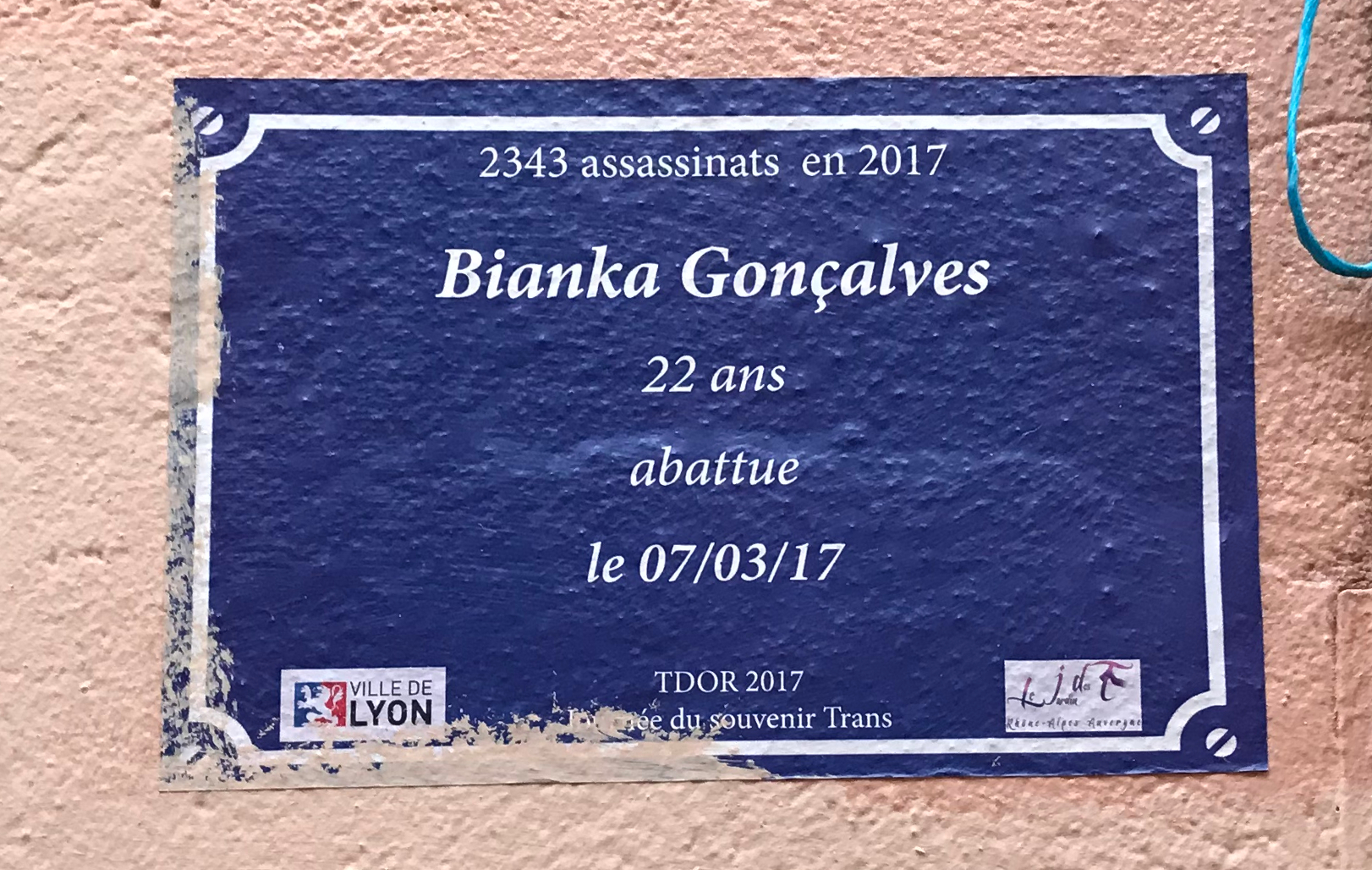 Fausse plaque de rue - Montée de la Grande Côte (Lyon) - souvenir trans - Bianka Gonçalves.